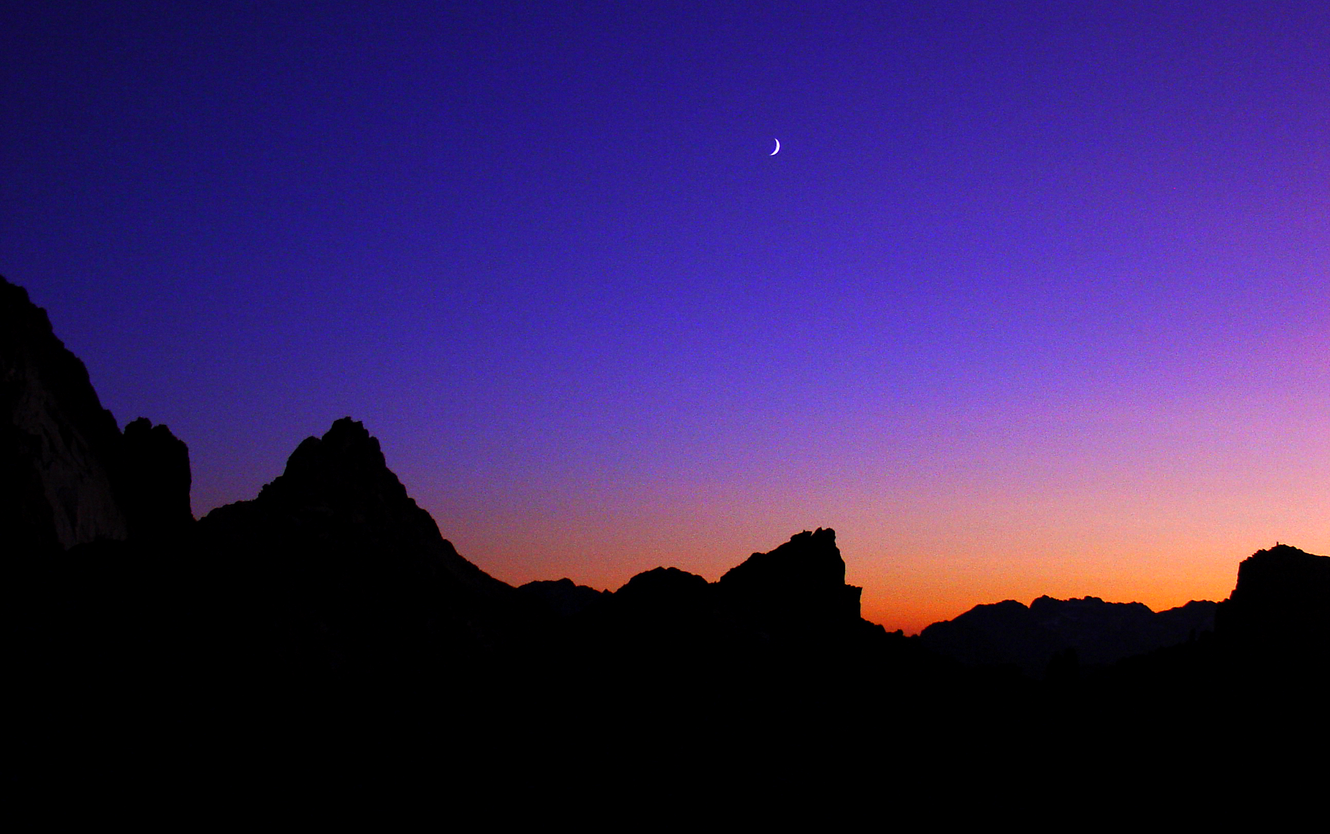 Aigüestortes This is a a photo of a natural area in Catalonia, Spain, with id: ES510081